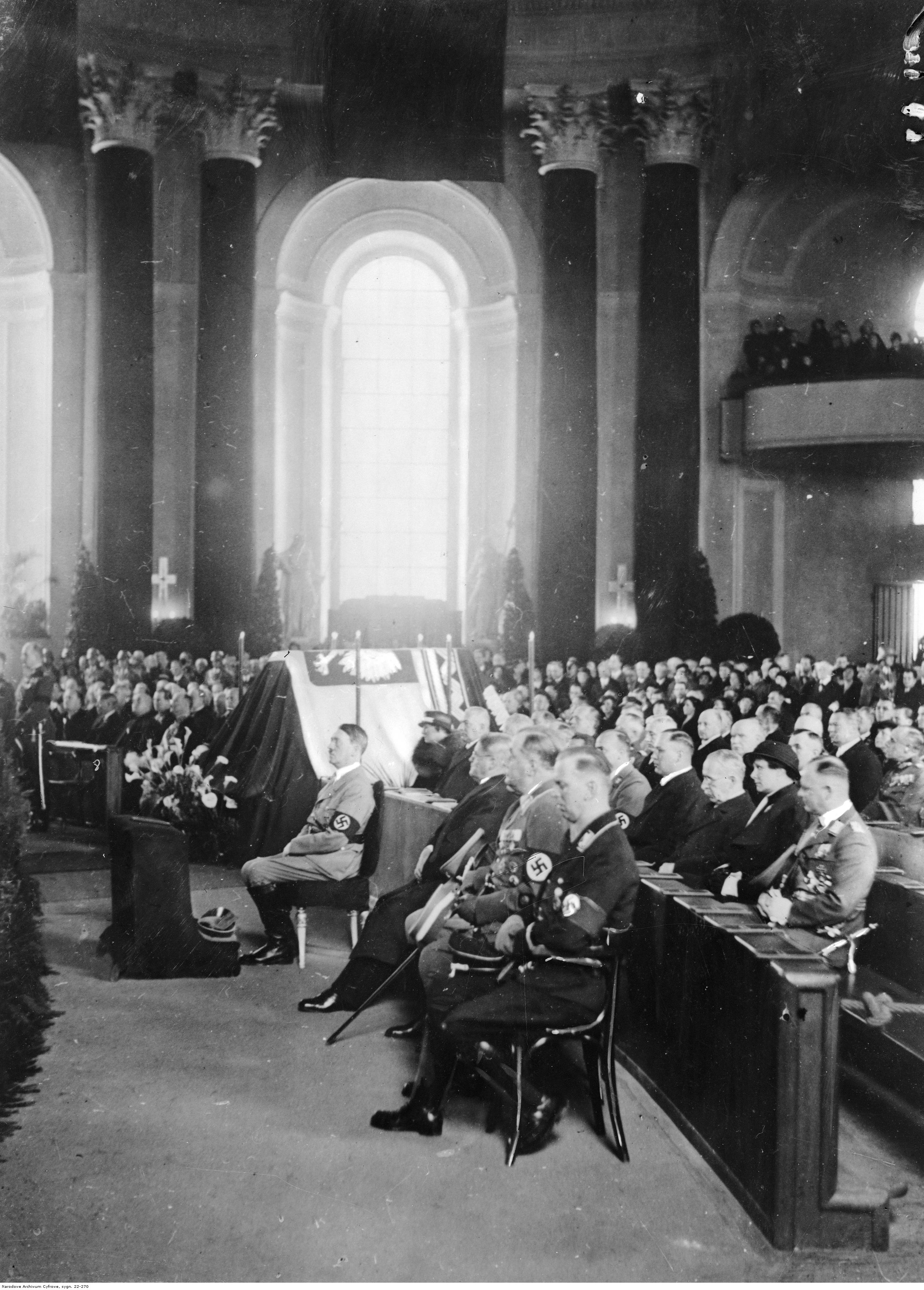 Fragment mszy świętej w kościele św. Jadwigi z udziałem najwyższych władz państwowych III Rzeszy. Przed klęcznikiem siedzi Adolf Hitler. W centrum kadru symboliczny katafalk.